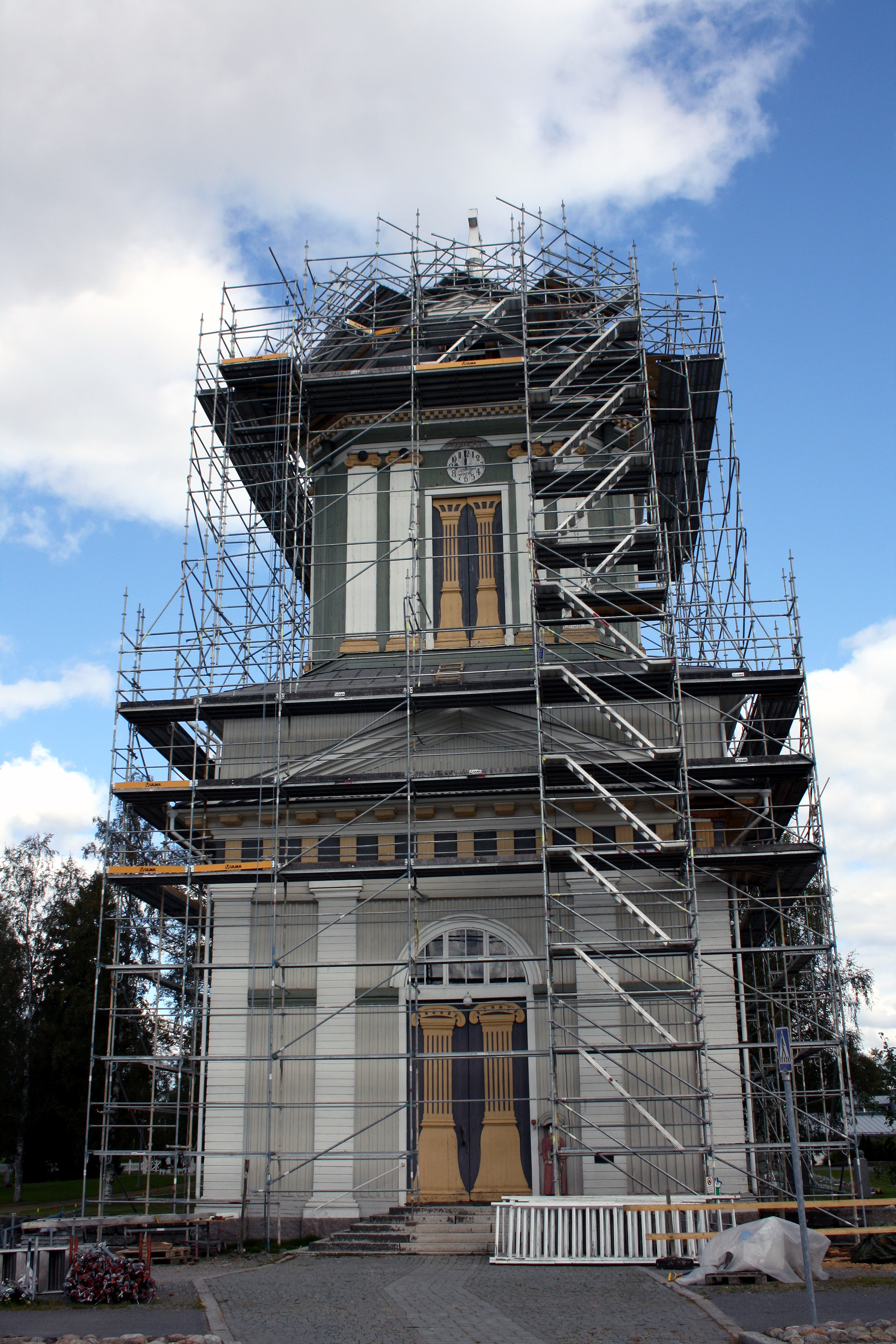 Kälviän kirkon kellotapuli.